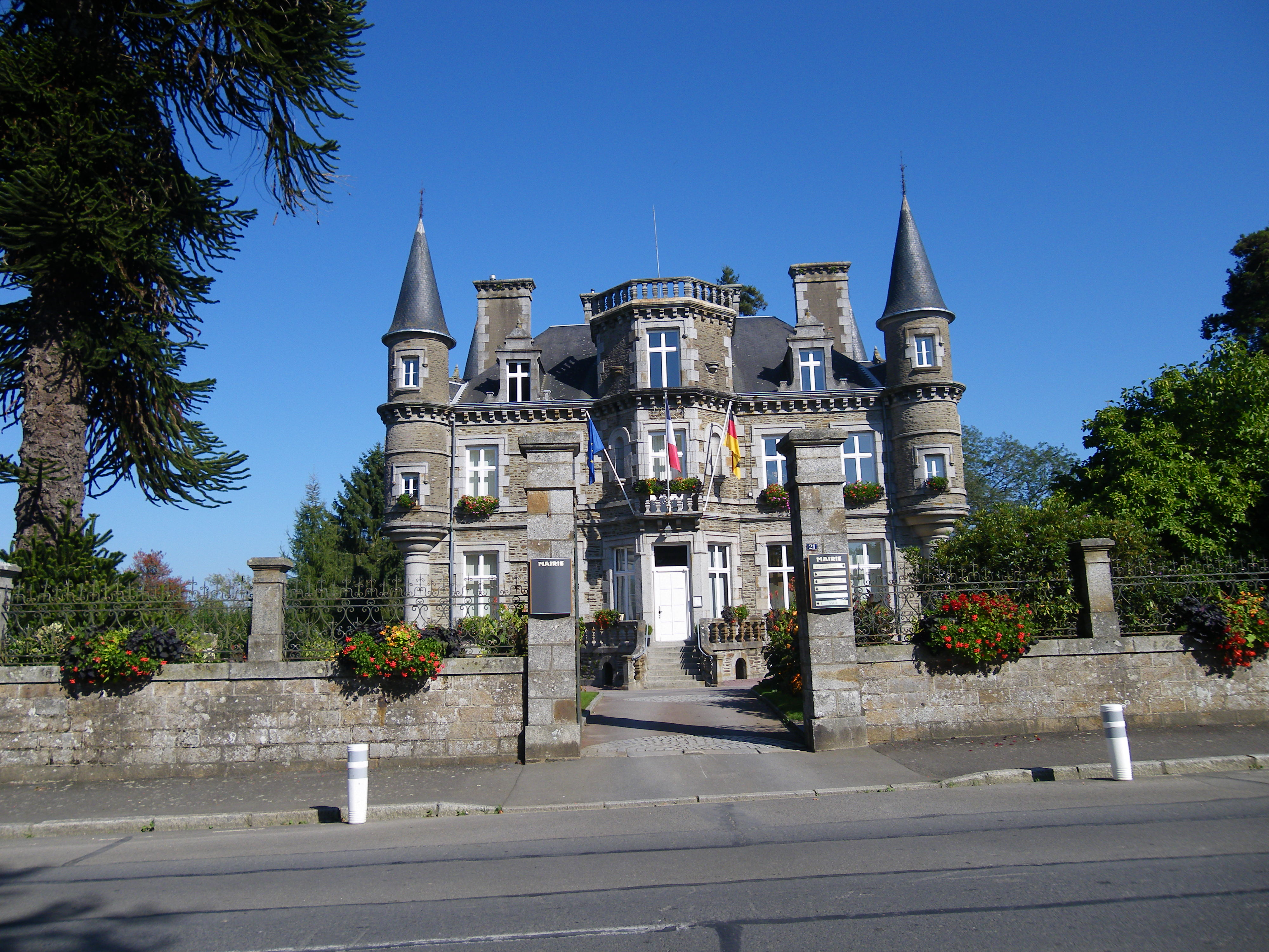 la mairie de st james